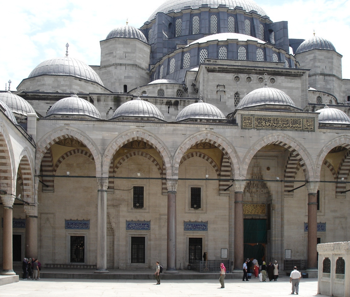 La Moschea di Solimano il Magnifico ad Istanbul, vista dal cortile antistante. Foto di: Giovanni Dall'Orto, 26-5-2006.